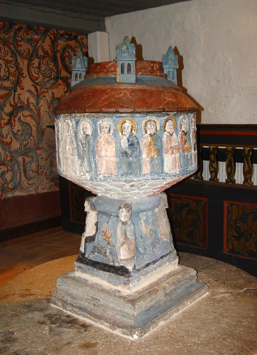 Bro kyrka (Gotland). Taufbecken Ende 12.Jh. von Sigraf